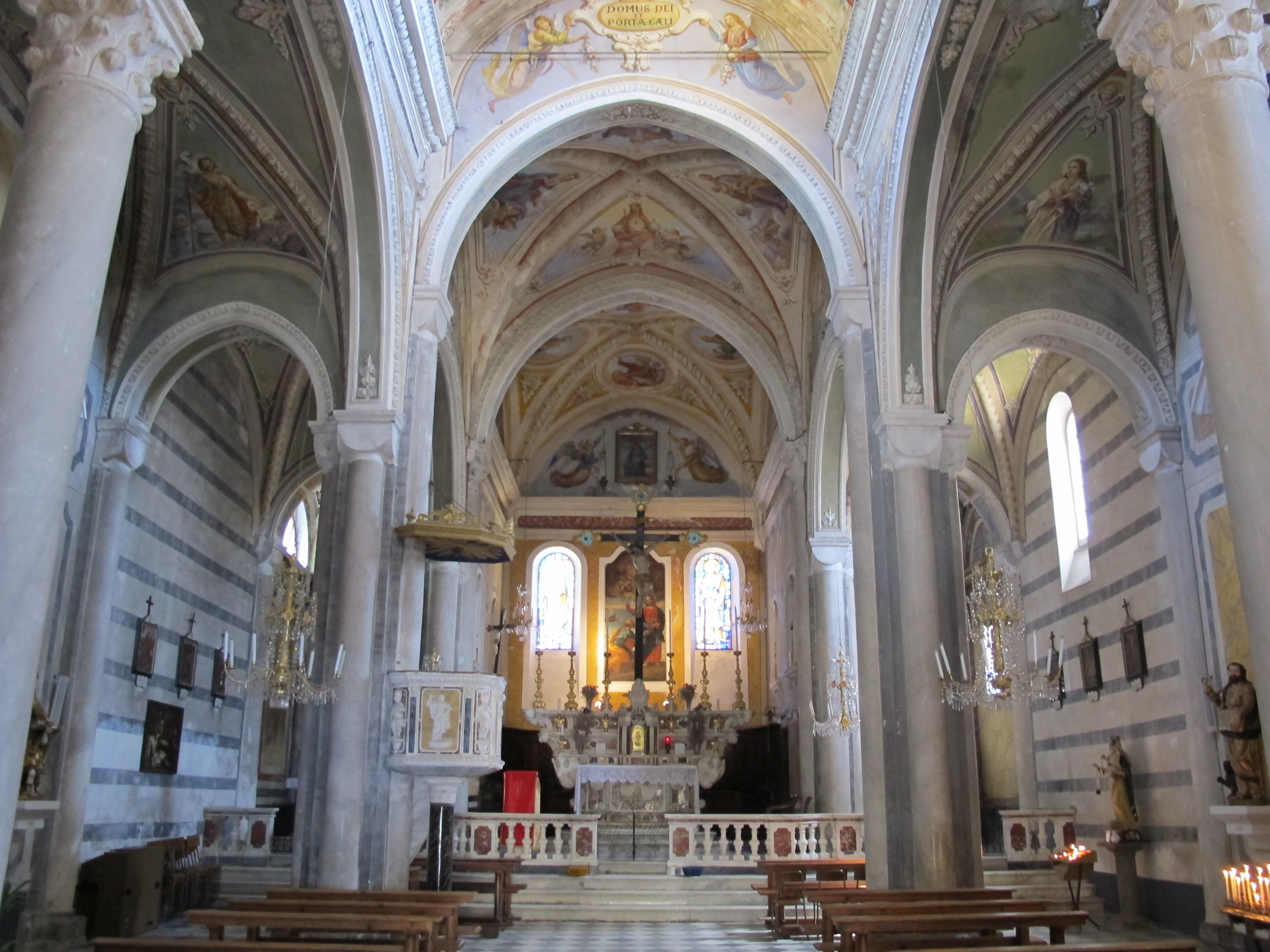 Corniglia, chiesa di San Pietro 06 interno